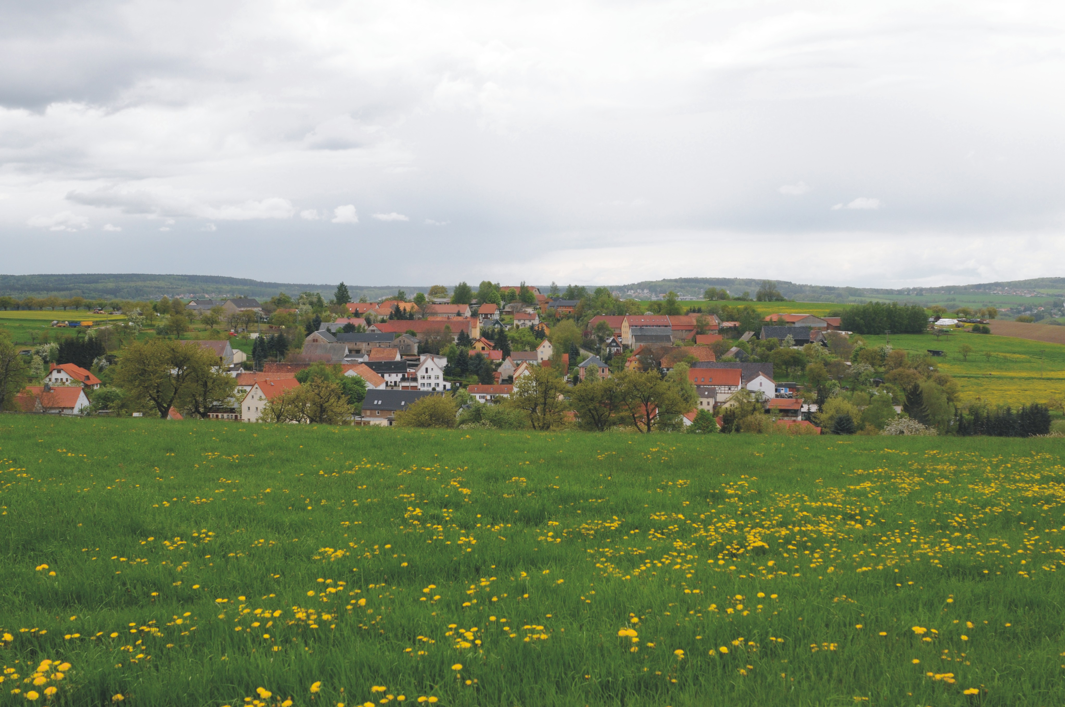 Blick von Weißig (Freital) auf Großopitz, im Hintergrund der Tharandter Wald in Richtung Kurort Hartha (Sachsen, Deutschland)